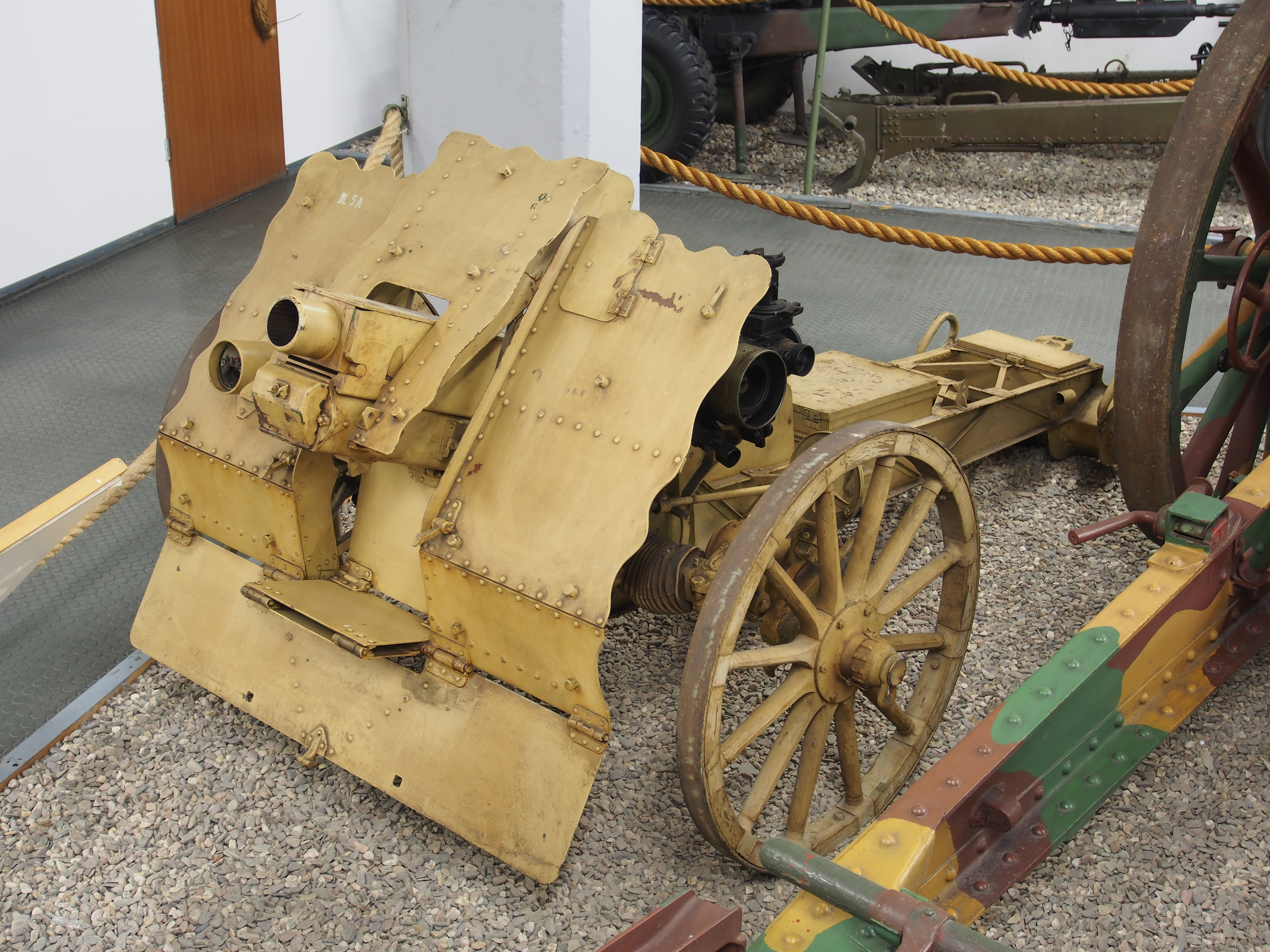 Photographed at the Wehrtechnische Studiensammlung Koblenz.